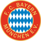 FC Bayern Munich - inofficial logo with gold to celebrate double of 1969